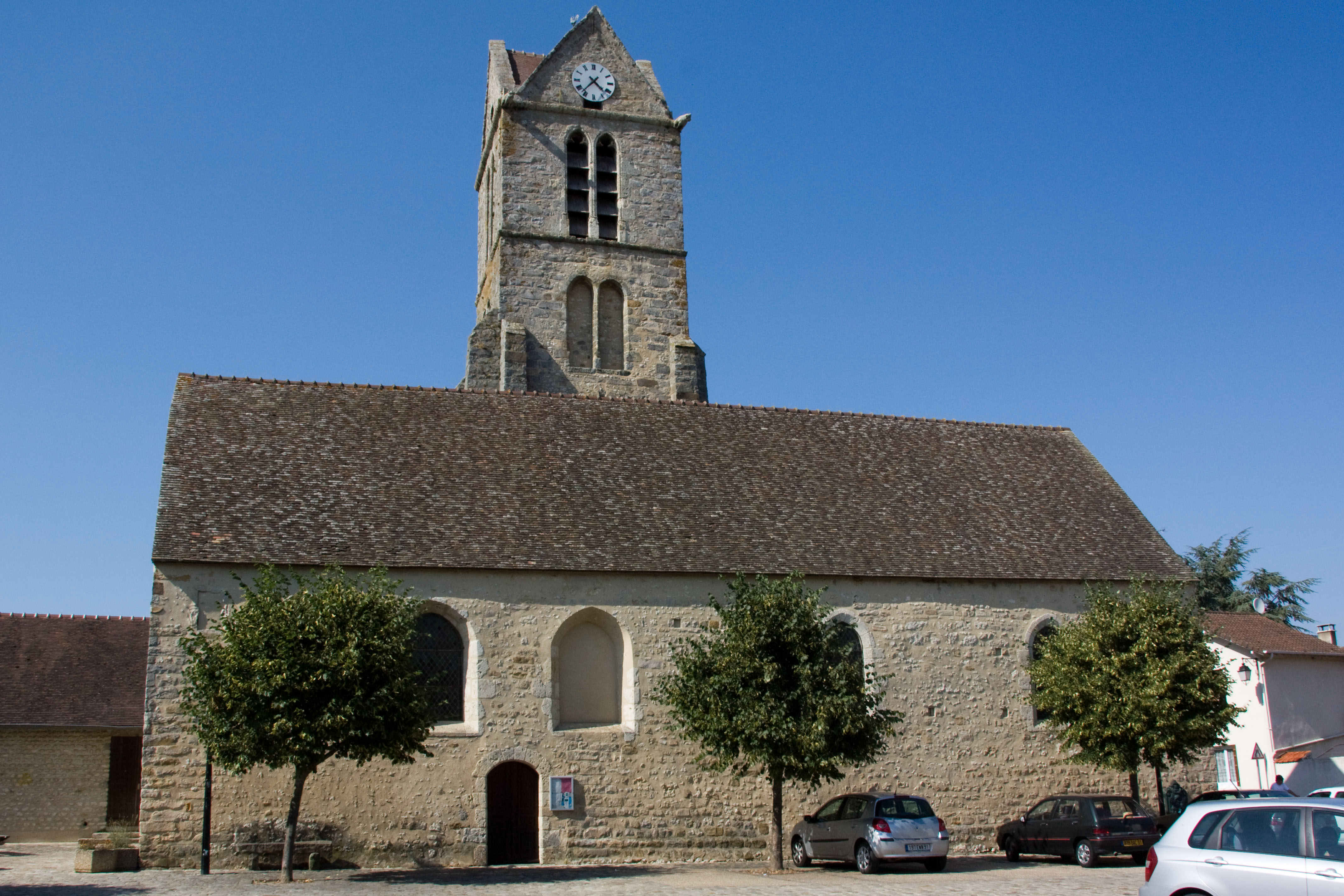 Eglise de Videlles, Videlles, Essonne, France